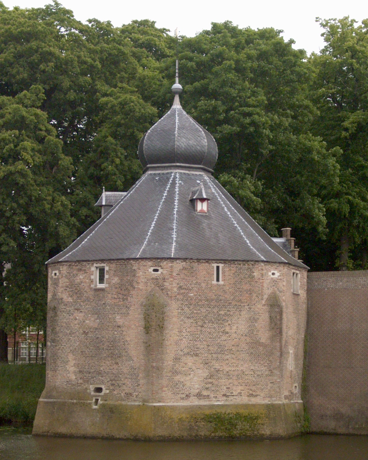 Zicht op een deel van de Granaattoren, de linker toren behorende bij het Kasteel van Breda. Gelegen nabij het Spanjaardsgat en de Haven van Breda. Niet ver van het centrum van Breda